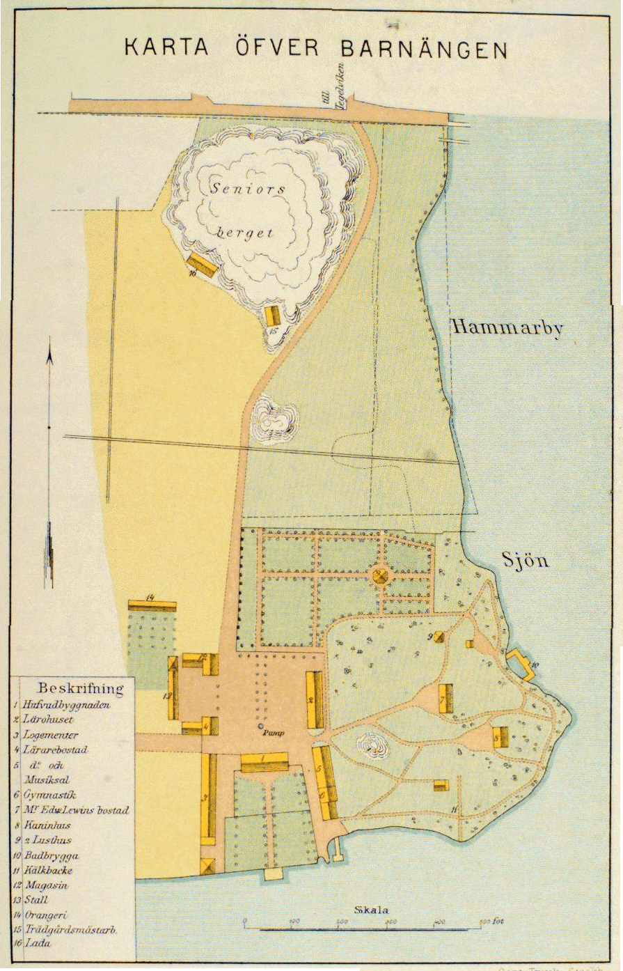 Karta över Barnängens gård